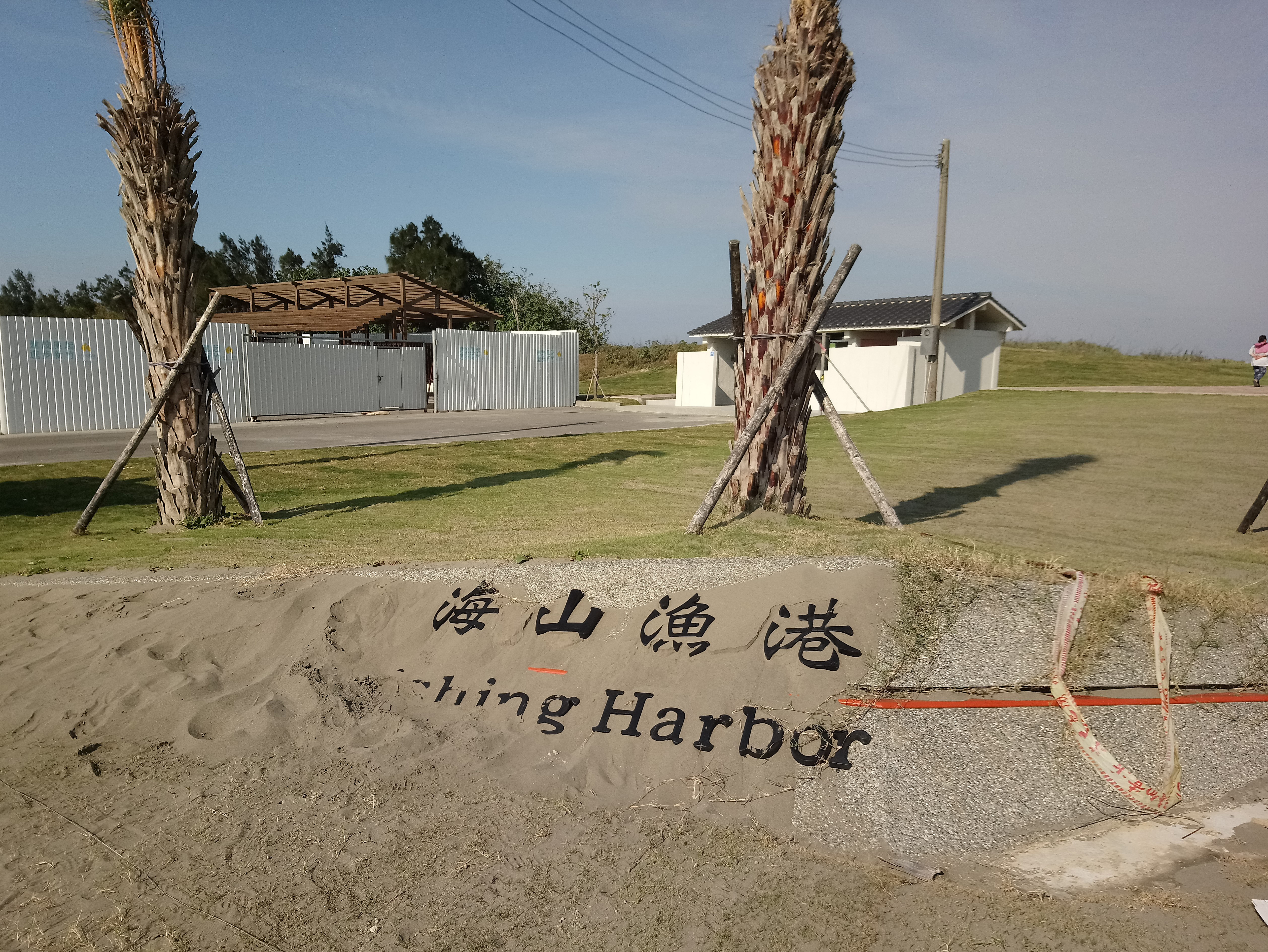 海山漁港標誌,台灣省新竹市香山區香山聯里朝山里